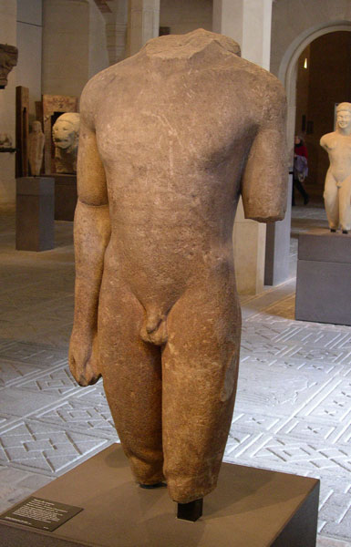 Tors de kouroi, procendent d’Actium. Cap el 550 aC